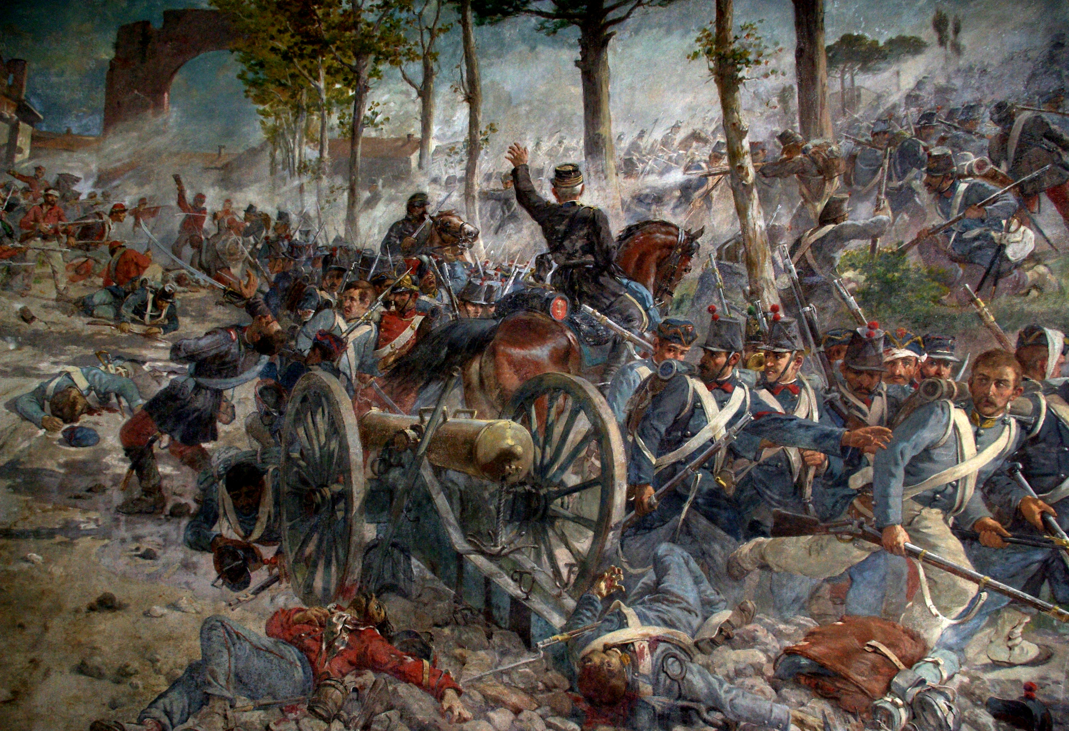 Ausschnitt eines Freskos im Turm von San Martino della Battaglia